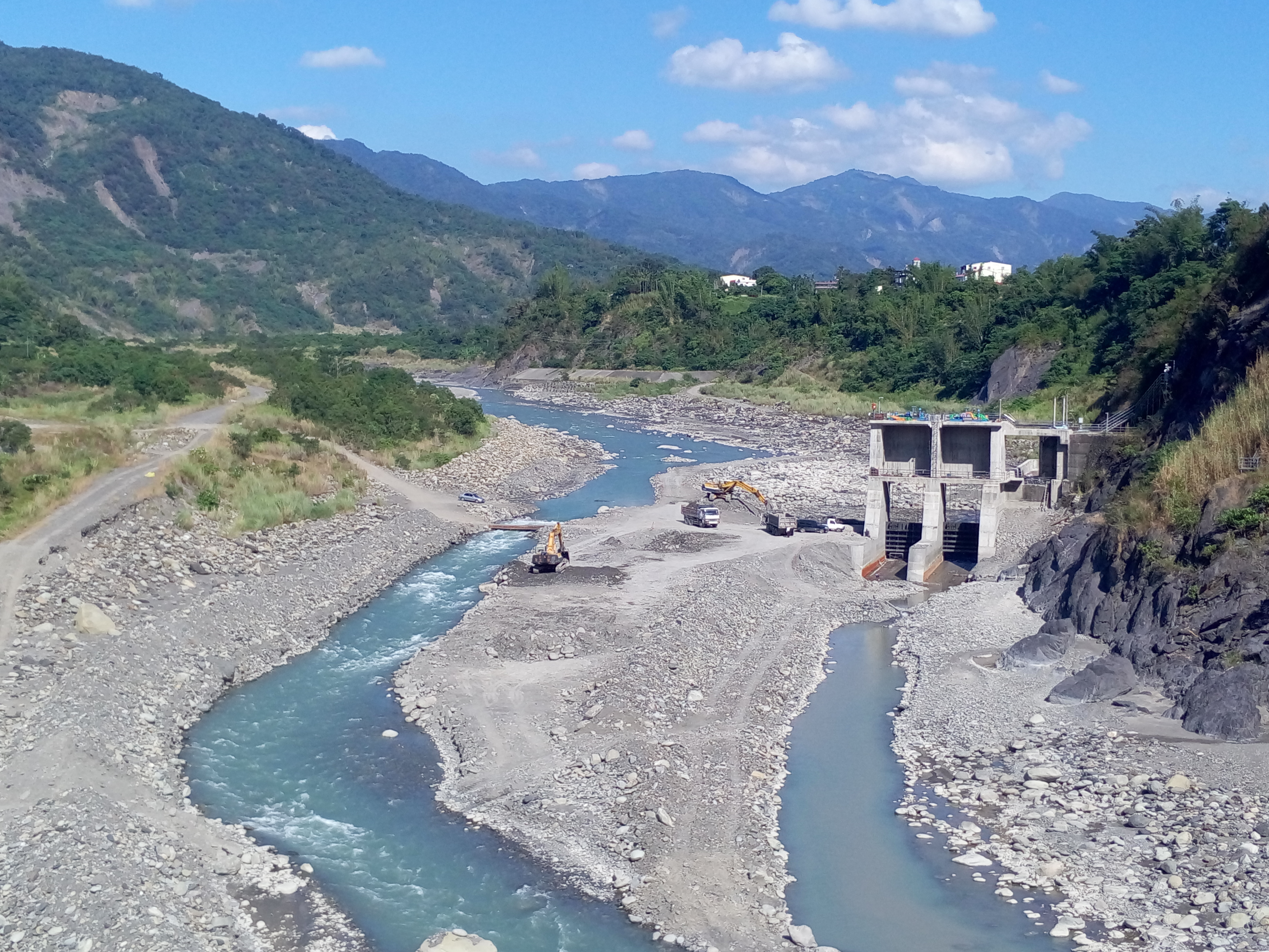 臺灣電力公司高屏發電廠六龜機組